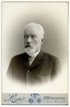 Рапп Евгений Кириллович. Портрет писателя работы Михаила Сергеевича Кучерова под фирмой «Лоренс», СПб, 1903 г.